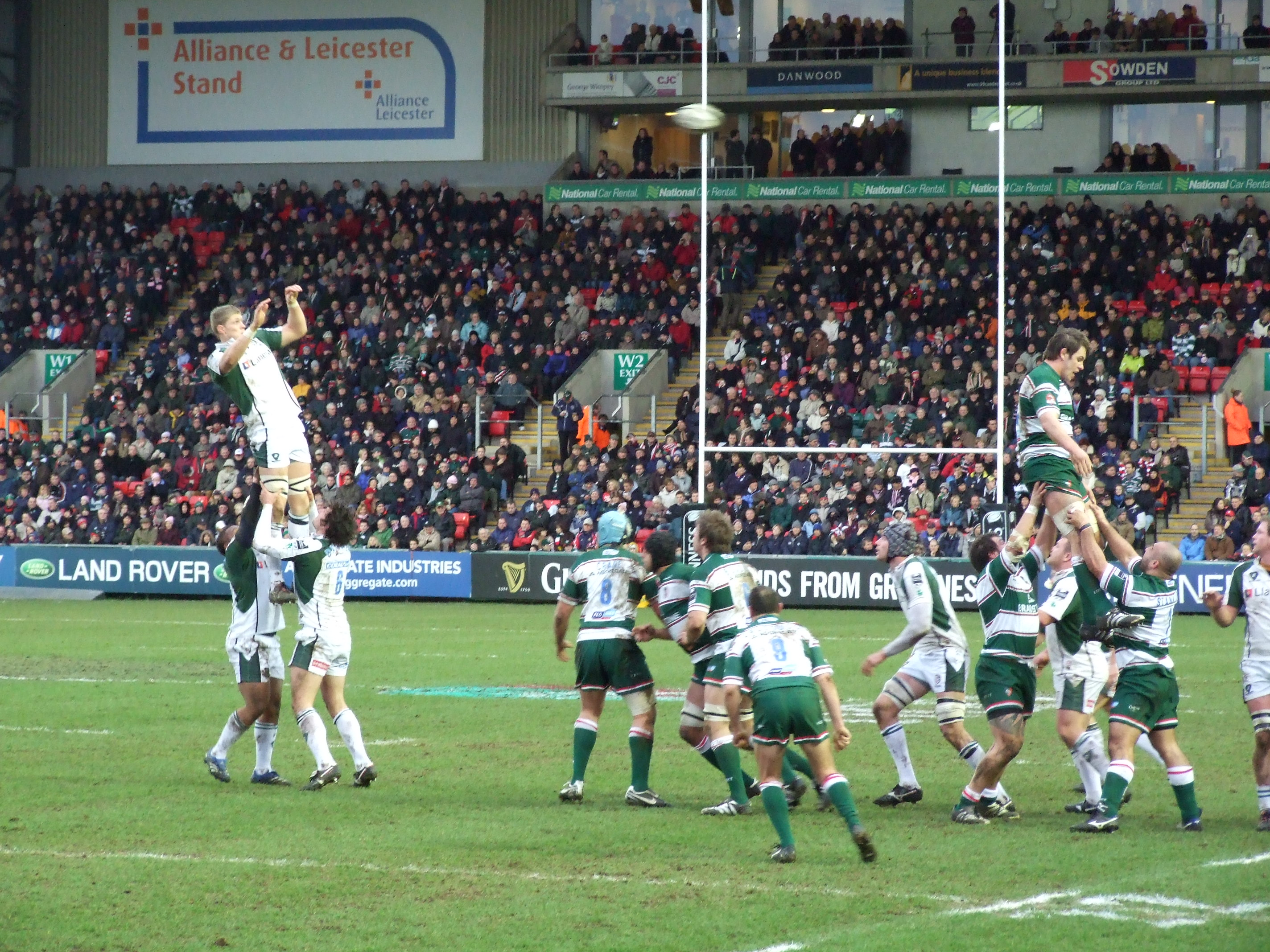 Leicester Tigers v London Irish - December 2007